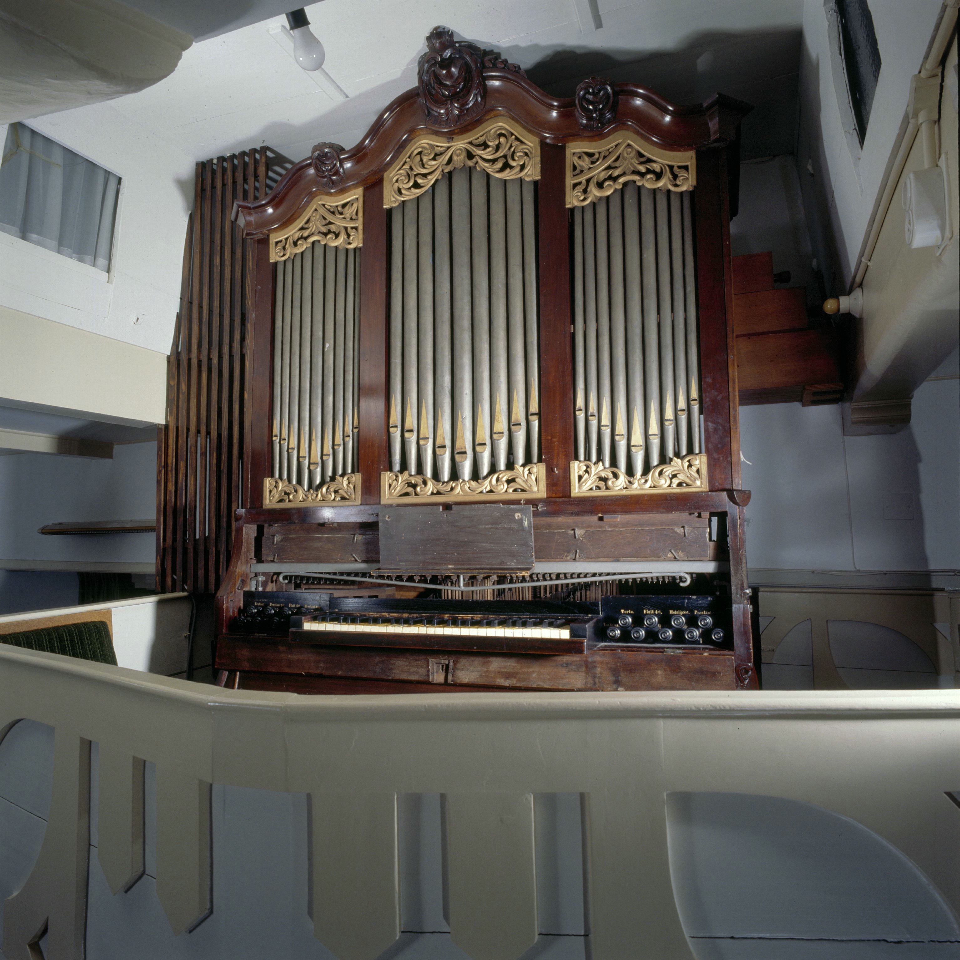 Kerk Oud Gereformeerde Gemeente: Interieur, aanzicht orgel (opmerking: Gefotografeerd voor Het Historische Orgel in Nederland 1769-1790) This is a possible Rijksmonument: Find the monument in the Monuments database: in Amersfoort All Rijksmonumenten in Amersfoort Is this a Rijksmonument? Yes No More information about this project and help. More images to work at in Category:Possible Rijksmonumenten.